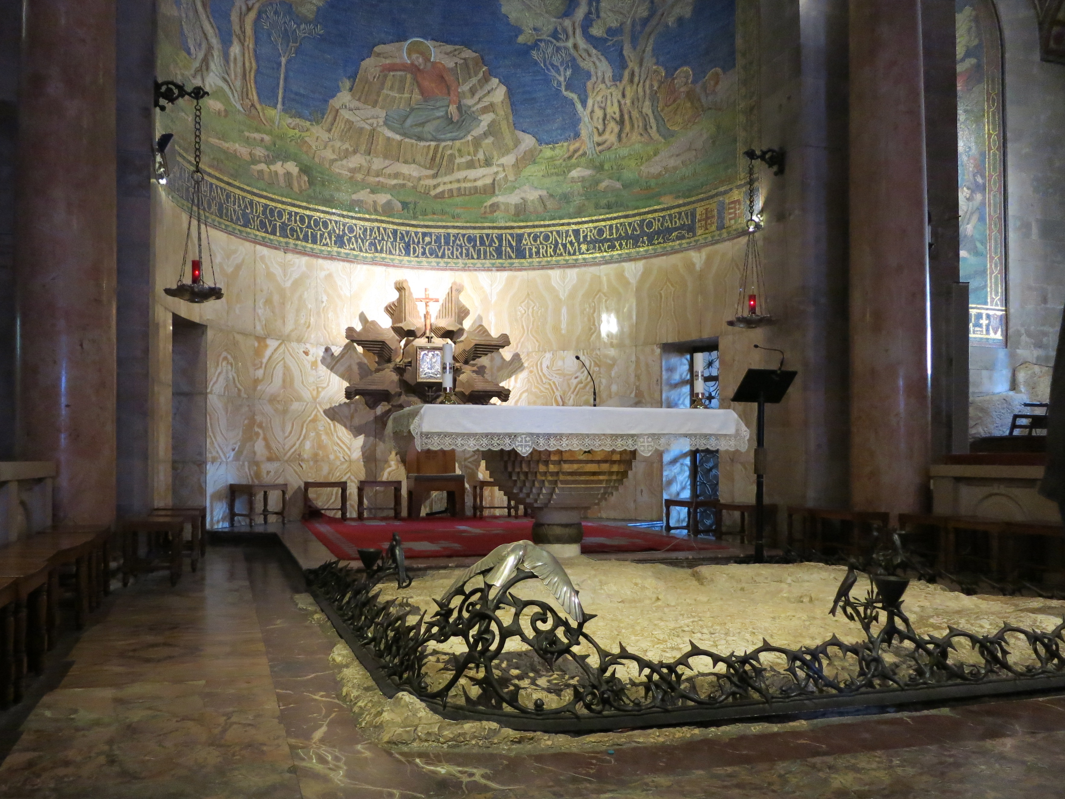 כנסיית כל העמים היא כנסייה פרנציסקנית השוכנת בנחל קדרון, על מורדותיו המערביים של הר הזיתים בירושלים. שמה הרשמי של הכנסייה הוא כנסיית היגון, אולם היות שהוקמה בכספי תרומות שנאספו מרחבי העולם הקתולי, היא זכתה לכינוייה. הכנסייה שוכנת בשטח הגן בגת שמנים, שבו על-פי המסורת הנוצרית, התפלל ישו את תפילתו האחרונה והתייסר, קודם להסגרתו לידי הרומאים בידי יהודה איש קריות.